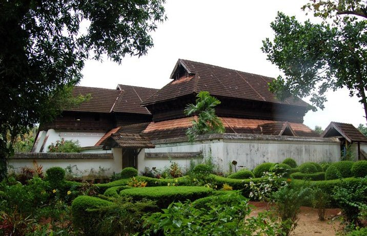 കൃഷ്ണപുരം കൊട്ടാരം, കായംകുളം